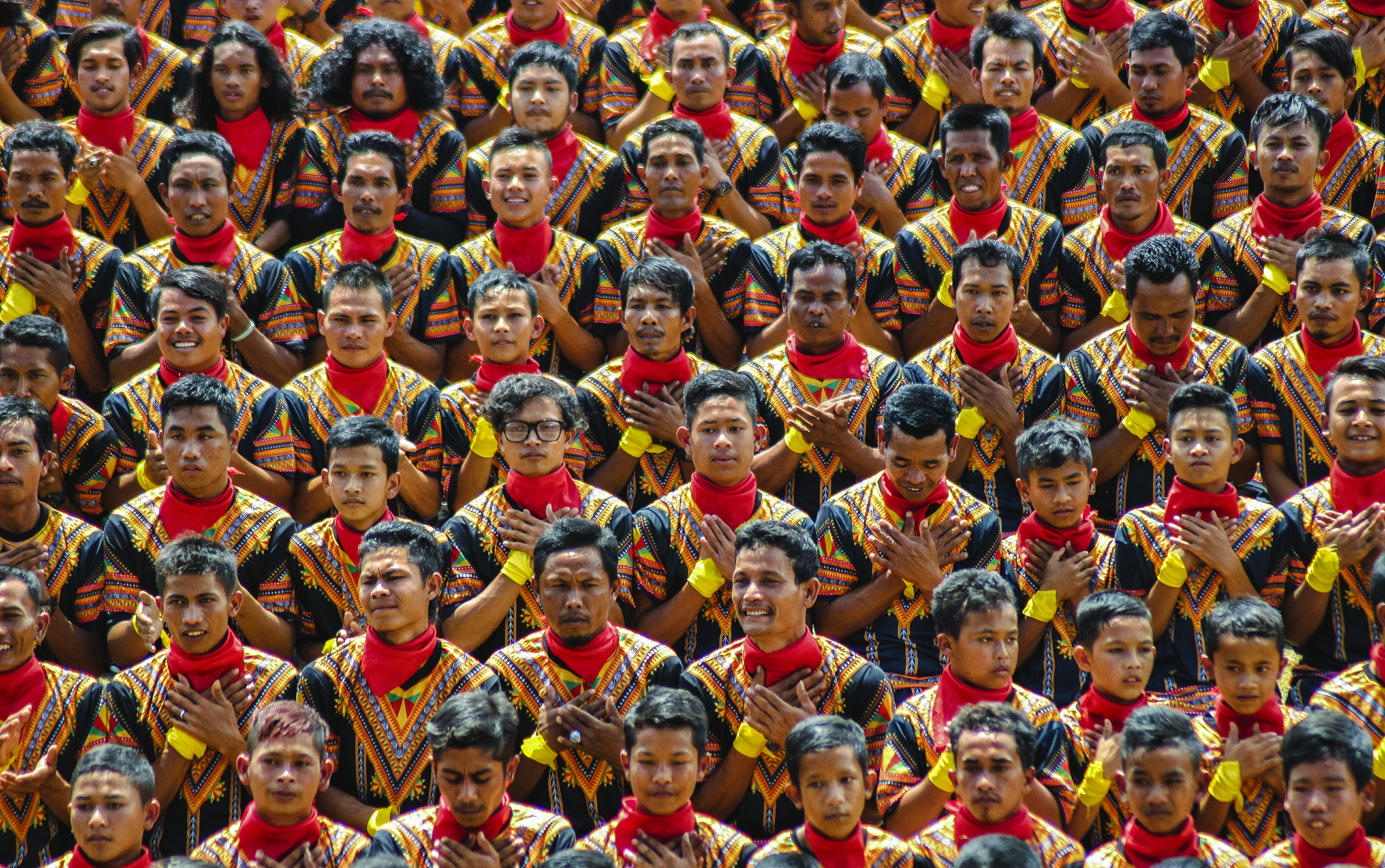 Pagelaran Tari Saman terbesar di dunia. 4 kabupaten, 11 kecamatan, 145 desa, 12.262 penari. Saman yang mengusung Tema "Saman Pengawal Leuser" ini dalam rangka menyambut 17 Agustus, merayakan 6 tahun penetapan saman sebagai warisan budaya tak benda dari UNESCO, juga utk memecahkan rekornya sendiri. "Saman itu asalnya dari hati nurani orang Gayo"